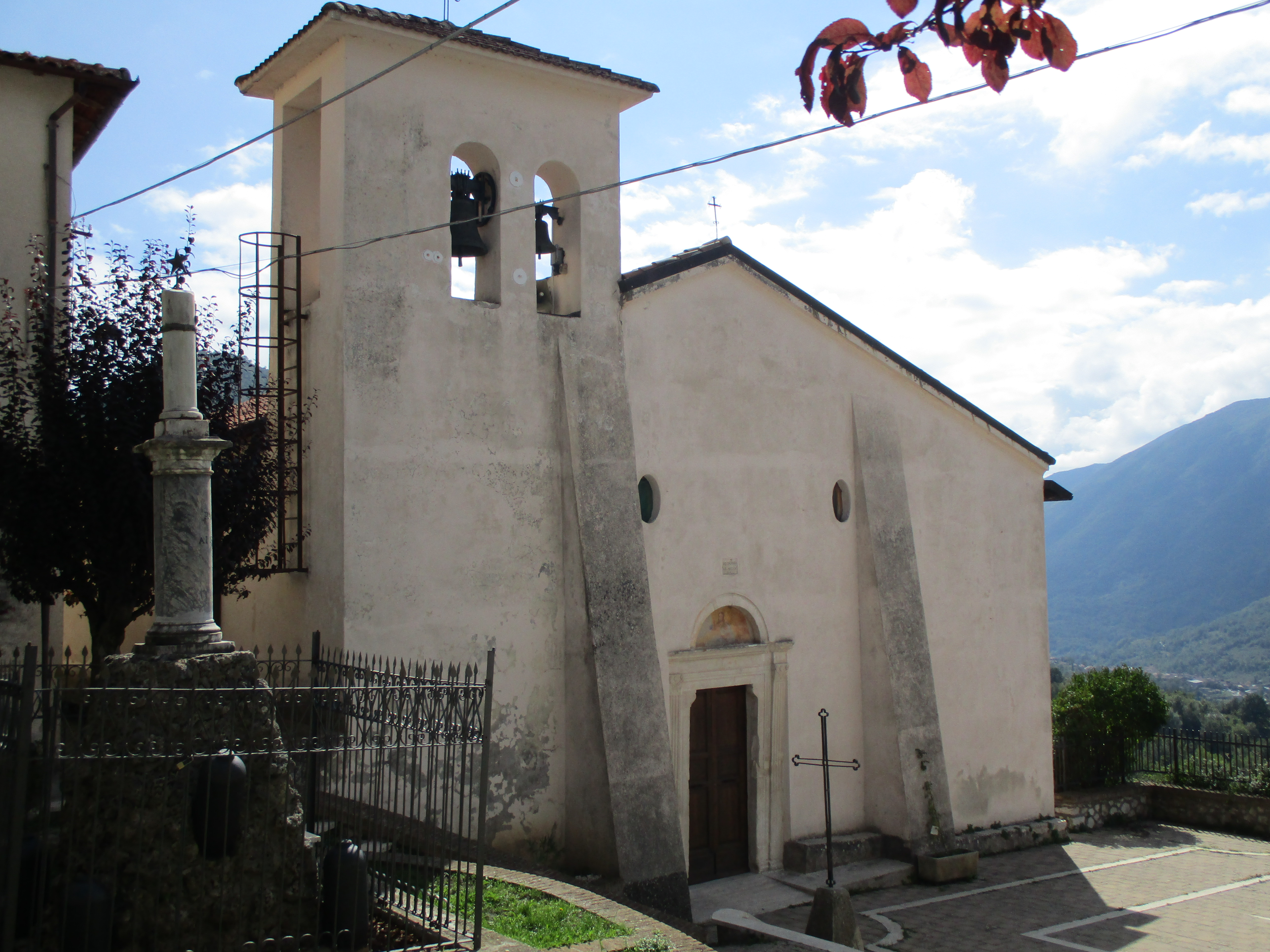 Facciata della chiesa del Ss. Salvatore